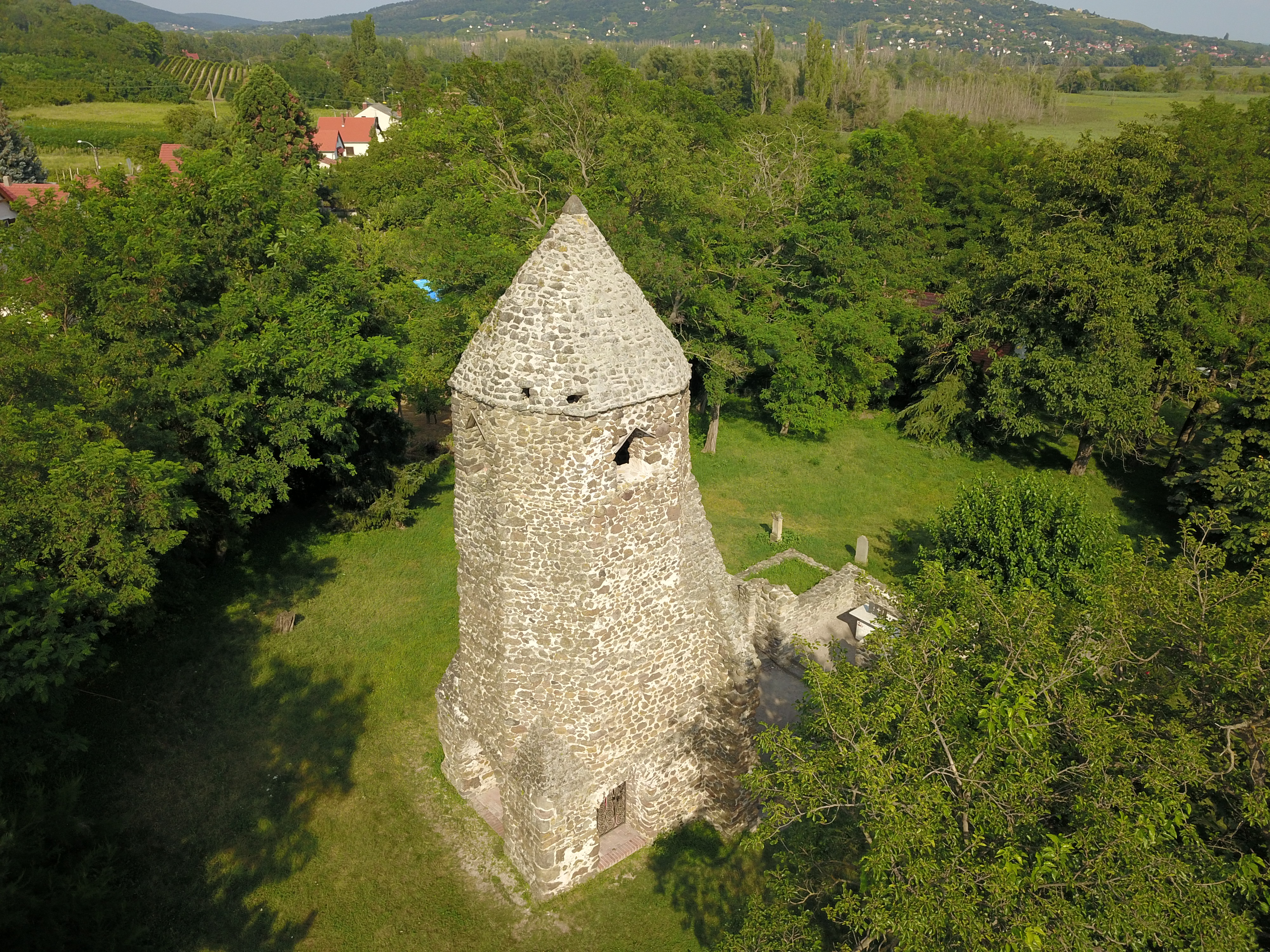 Szigliget Avasi templomrom légifotón